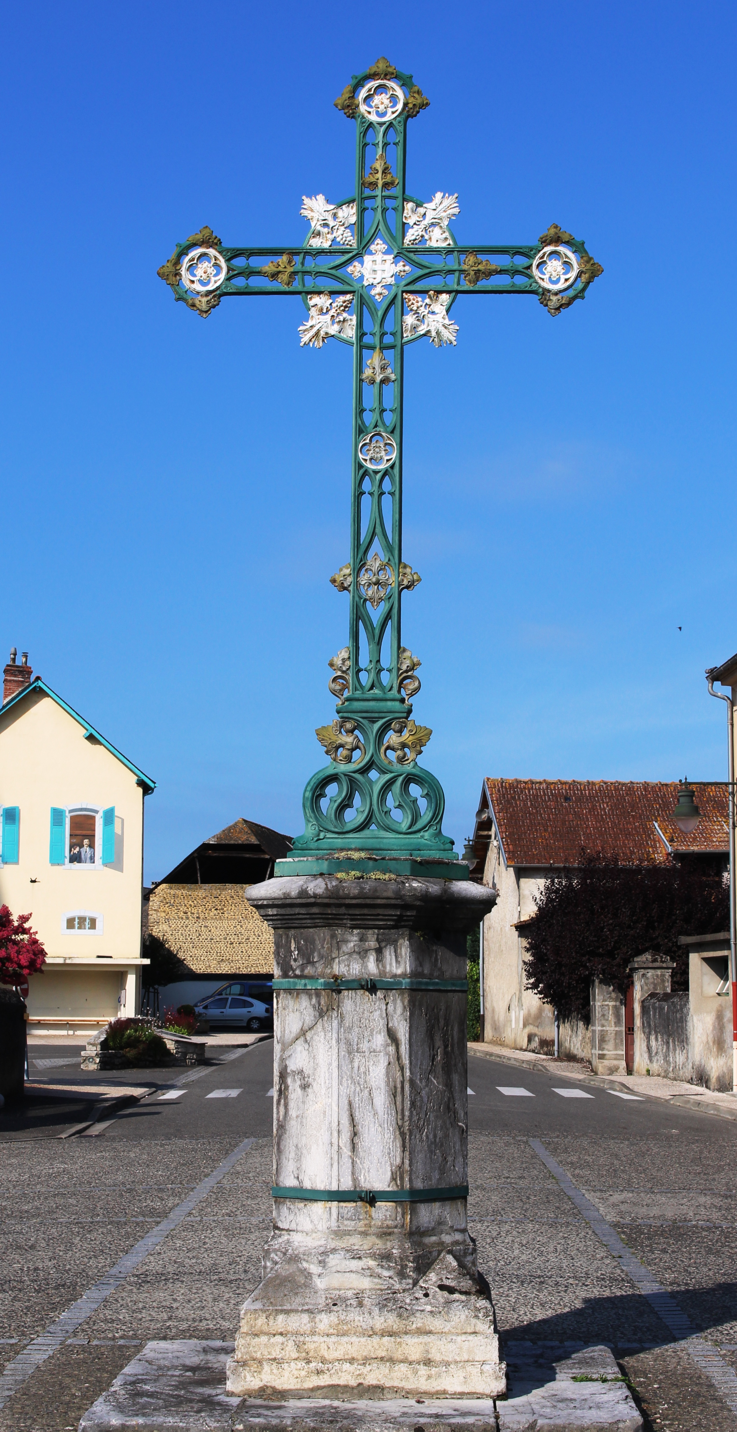 Croix de Louey (Hautes-Pyrénées)